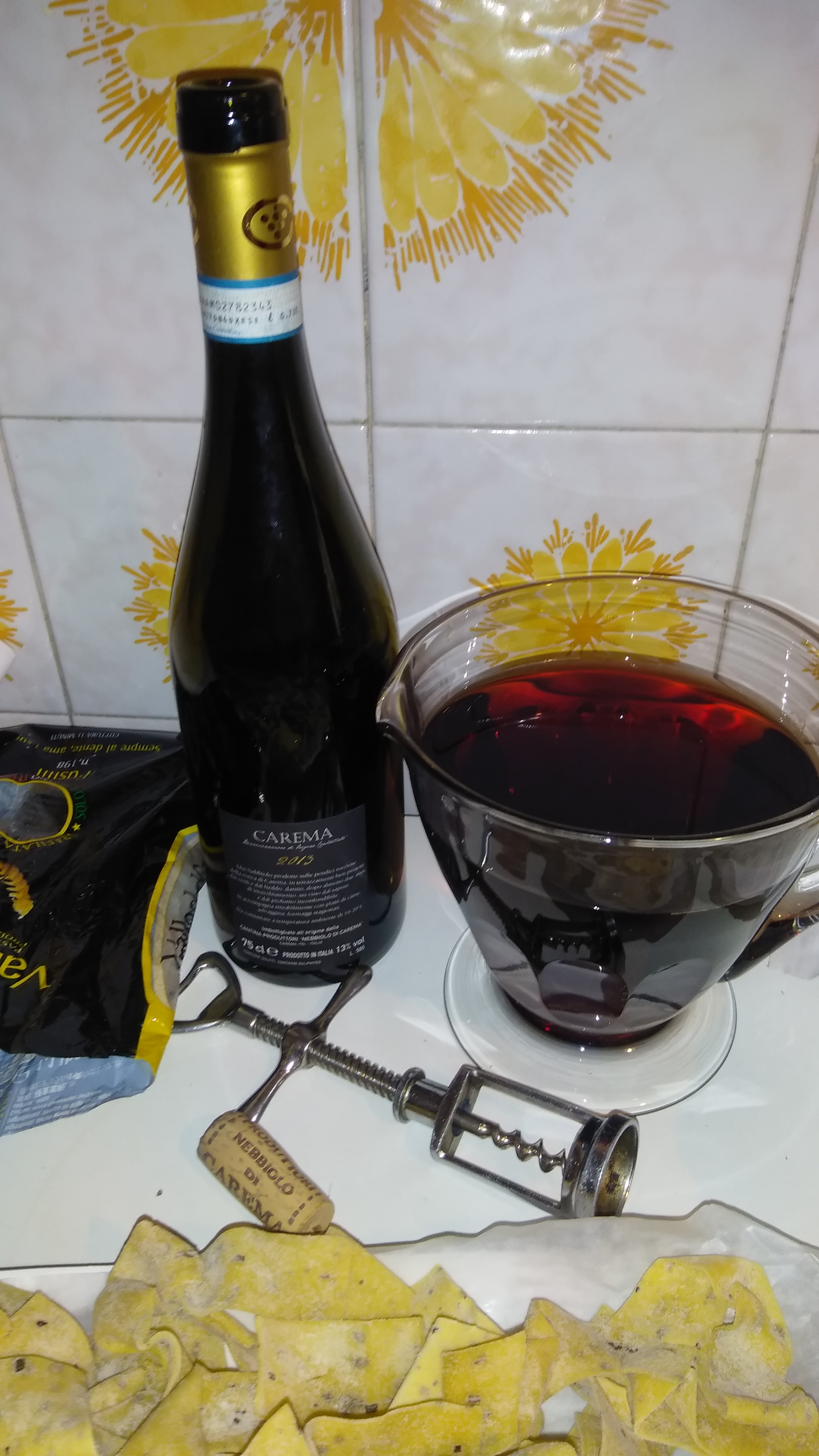 Carema DOC 2013 scaraffato